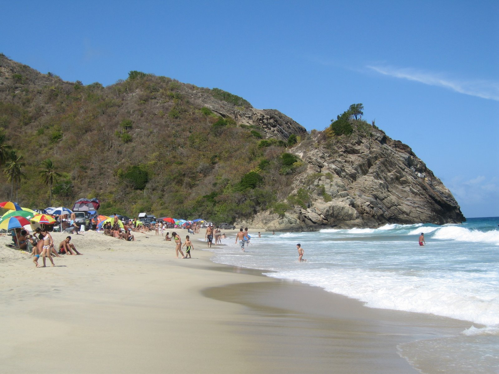 Cuyagua, estado aragua, venezuela